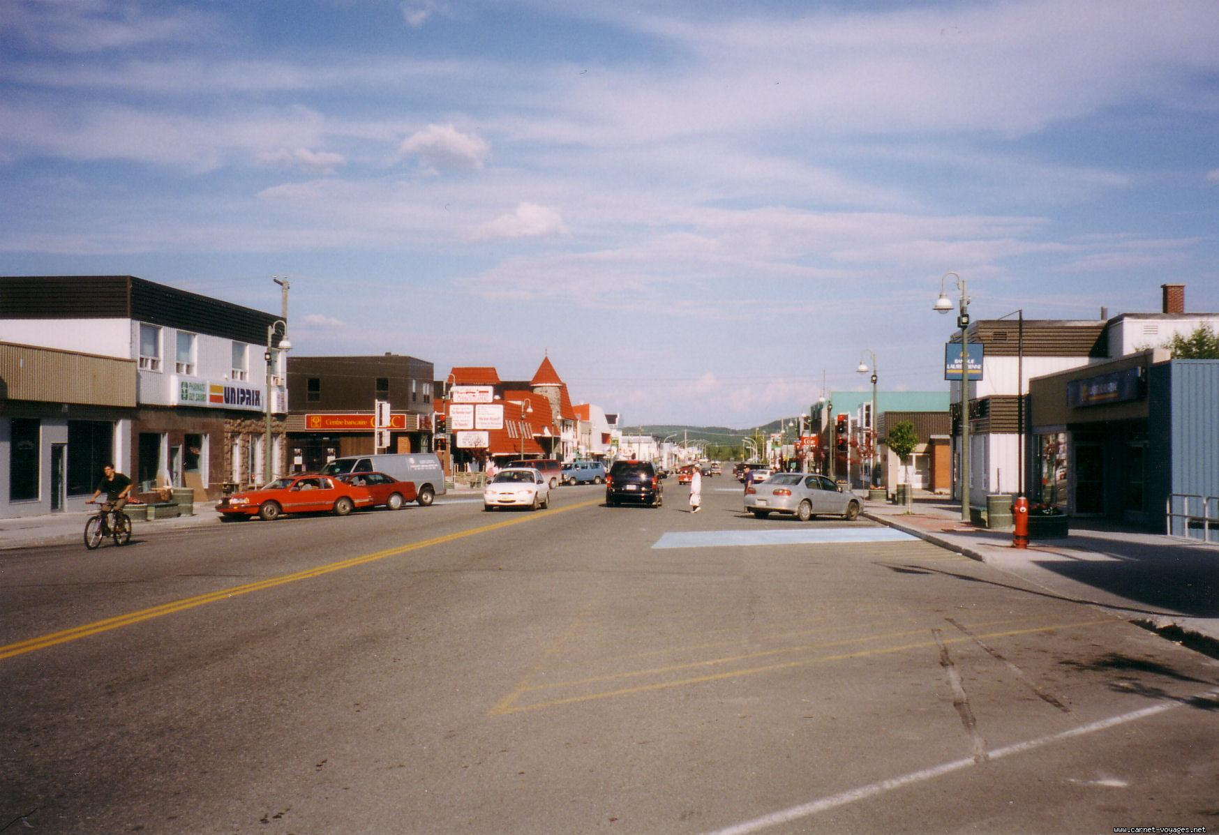 Description: Rue principale de la ville de Chibougamau, Chibougamau est une ville du Québec (Canada), située dans la région administrative du Nord-du-Québec. Elle compte environ 8000 habitants et est la plus grosse ville non autochtone du Nord-du-Québec. Auteur: Juju ( Site web